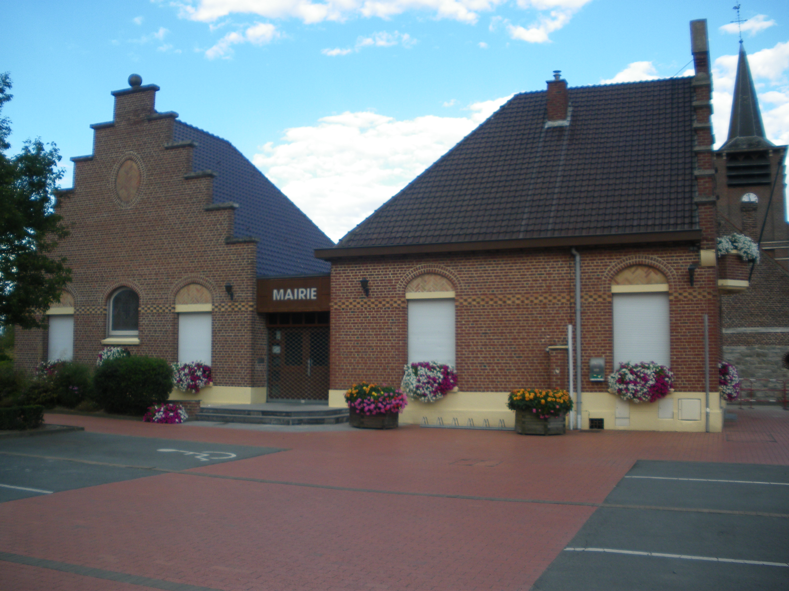 Vue de la mairie de Genech.